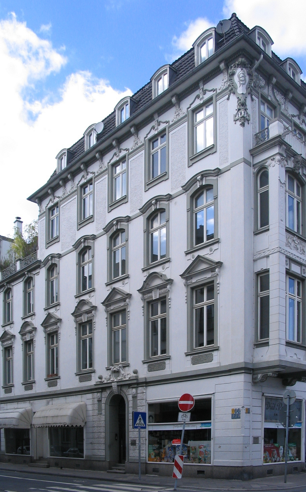 Düsseldorf, Benrather Straße 6 b (sichtbarer Hauseingang), nach rechts Carlsplatz 3-4. Denkmalgeschütztes Bauwerk.